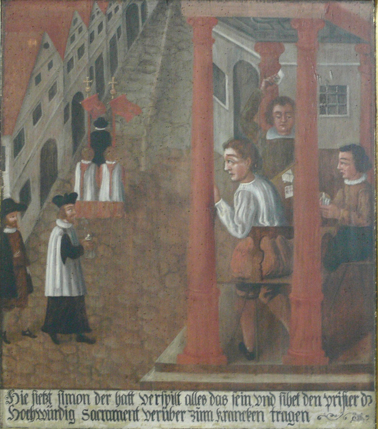 Zwölf Holztafeln des 17. Jahrhunderts zur Gründungslegende des Klosters zum Heiligen Grab, Klosterkirche zum Heiligen Grab, Bamberg. Zusammenschau mit Texttranskription siehe Seite Gründungslegende des Heilig-Grab-Klosters Bamberg. Nr. 1